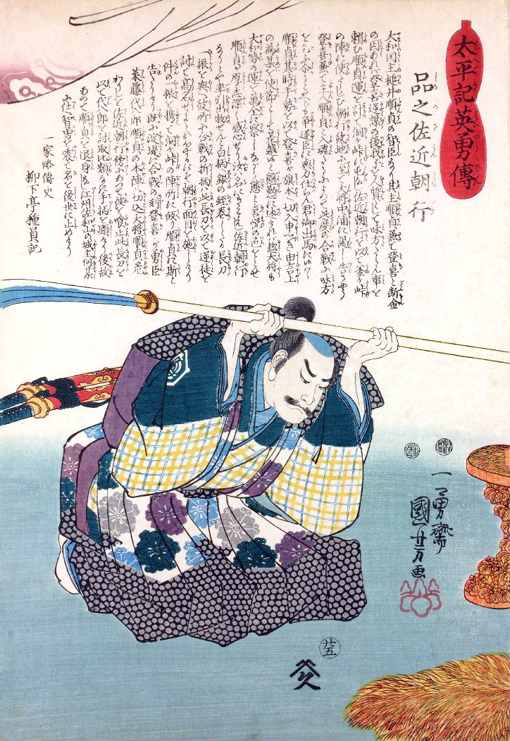 「太平記英雄伝廿五：品之左近朝行（島左近）」